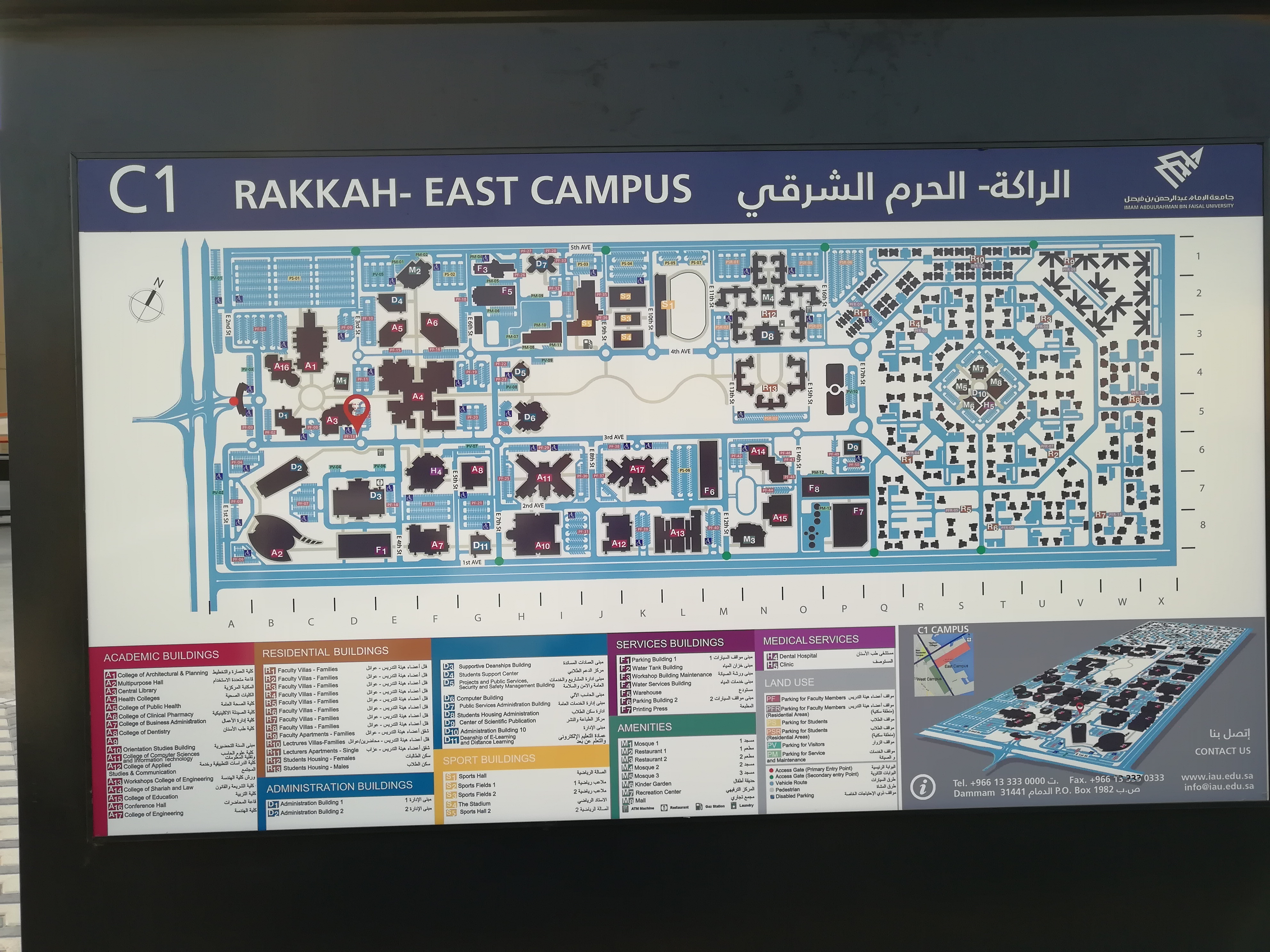 Imam Abdul-Rahman bin Faisal University campus map